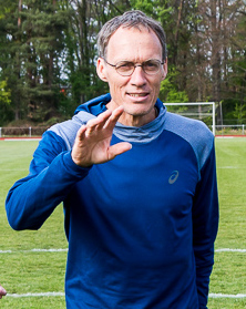 Dieter Baumann am 28. April 2017 in Pfungstadt